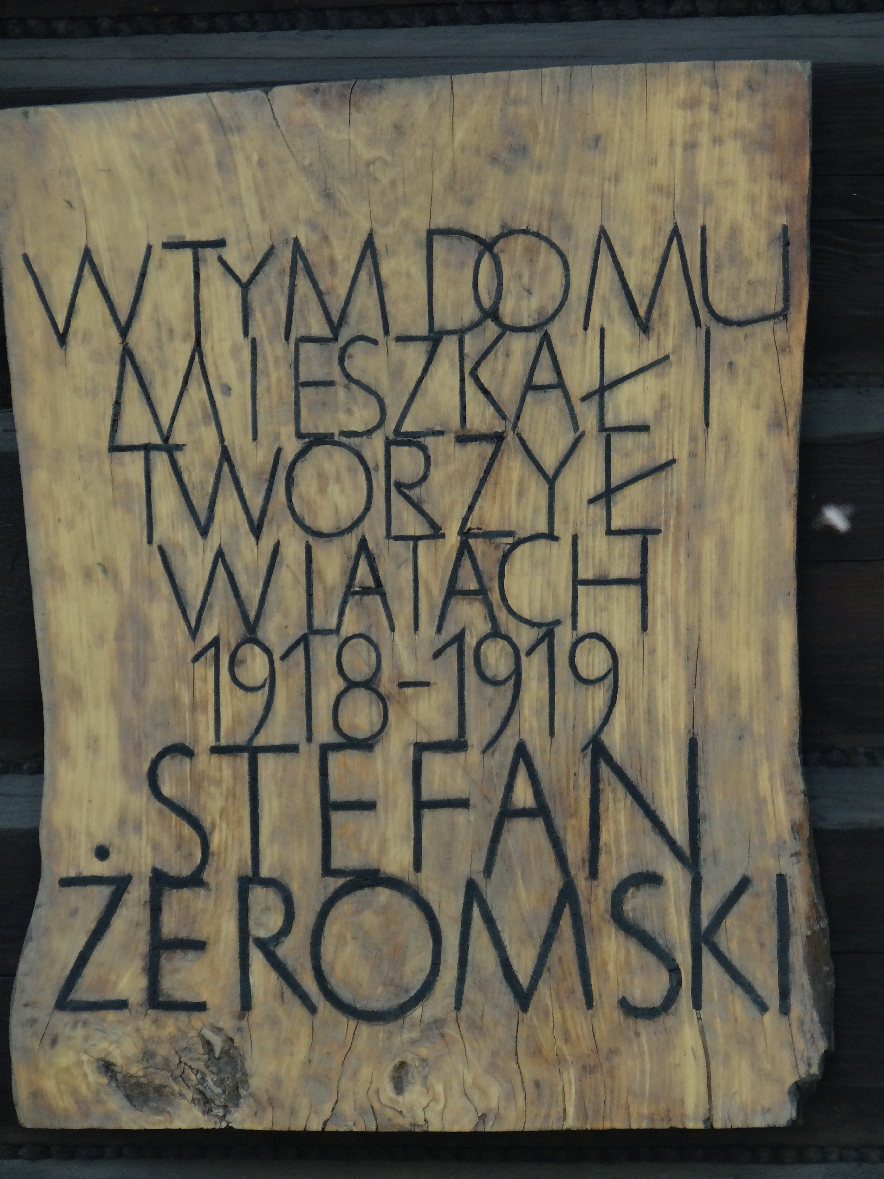 Zakopane, ul. Kasprusie 27 - willa „Czerwony Dwór” (zabytek nr /A-115/M)